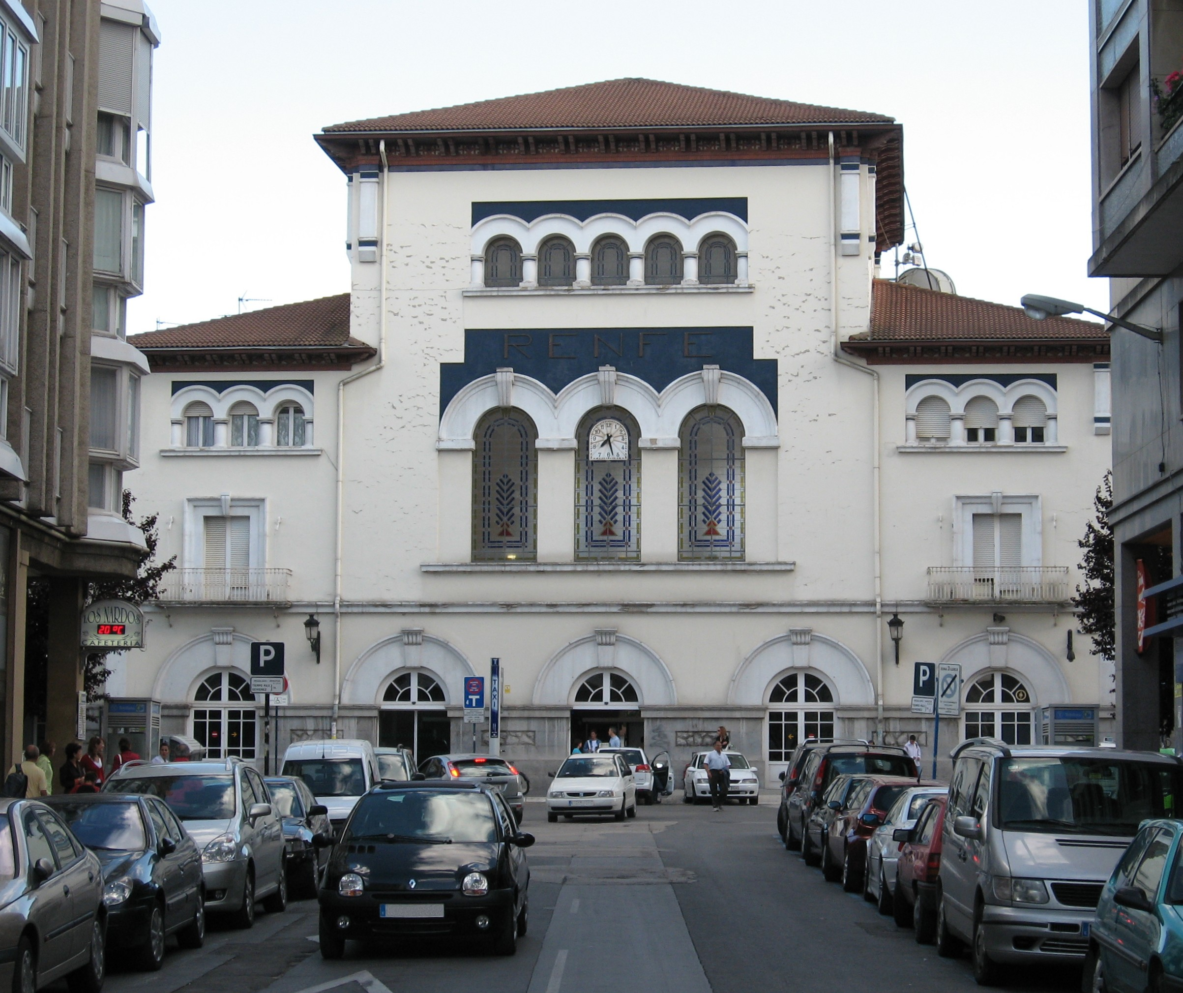 Desc: Estación del ferrocarril en Vitoria-Gasteiz